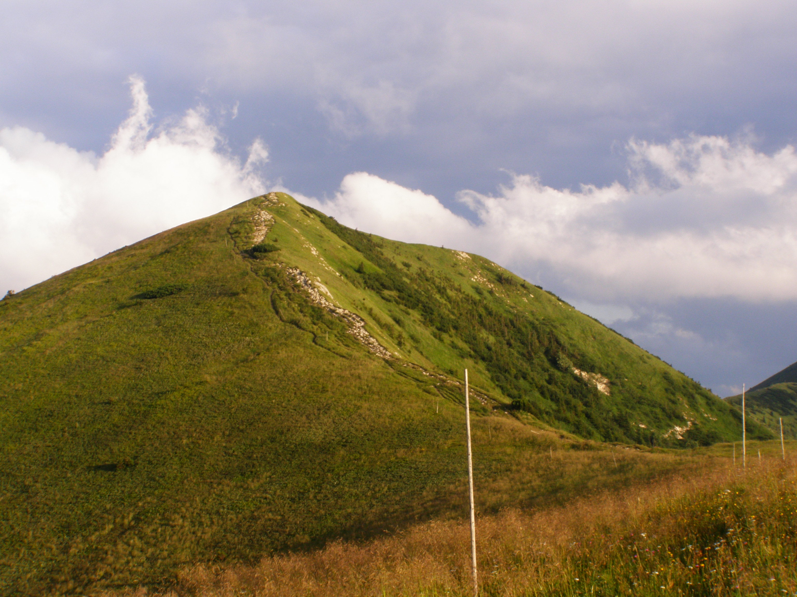 Krivánská Malá Fatra, Poludňový grúň